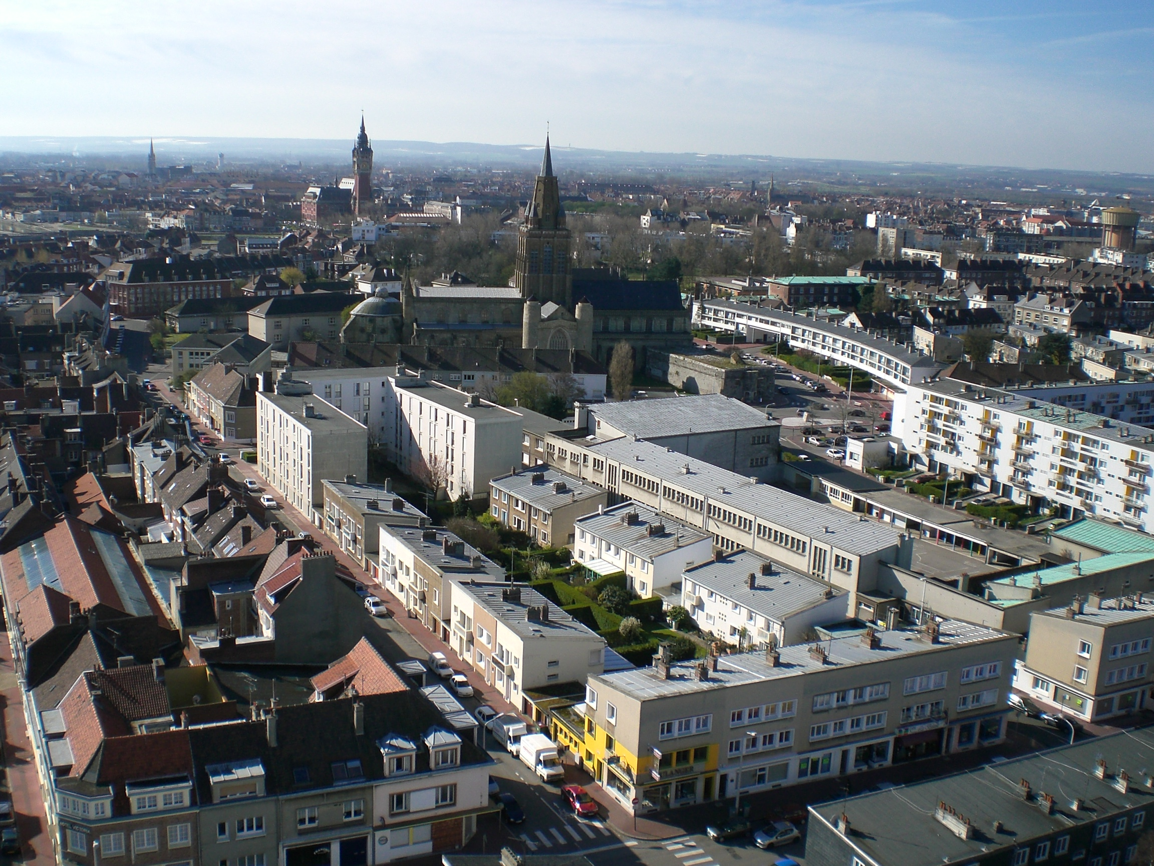 La ville de Calais vue du haut du phare direction sud. On distingue bien l'église Notre-Dame, ensuite le beffroi de l'Hôtel de Ville de Calais et au loin, on peut apercevoir la paroisse Saint-Pierre.